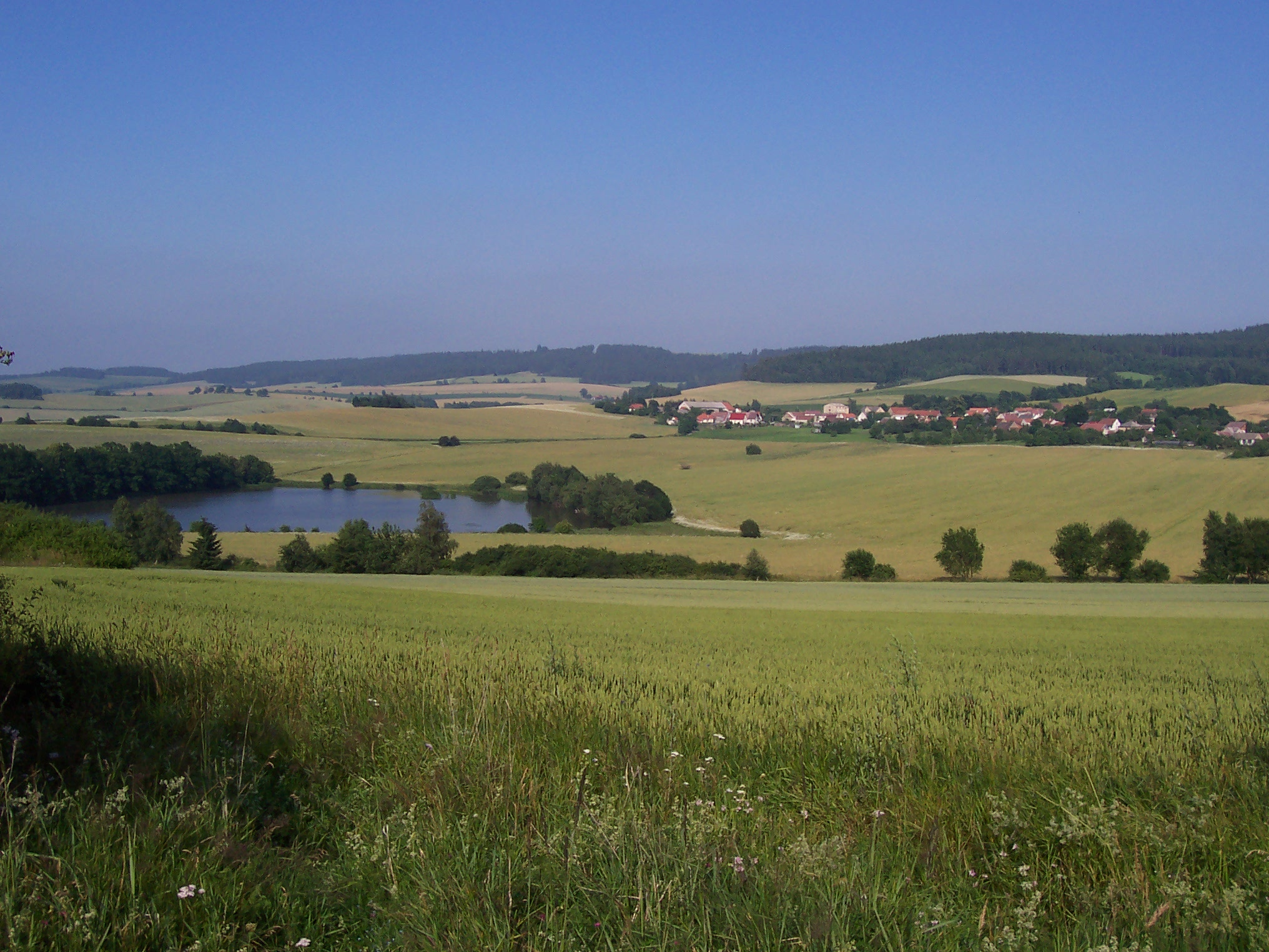 Vpravo Vilice, vlevo Velký Vilicky rybník. Foceno z úbočí Husí hory